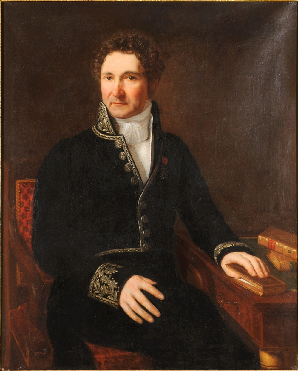 Jean-Baptiste de Martignac, Premier ministre de Charles X, portrait peint par Sophie Feytaud, style "Restauration Charles X", 79 cm (largeur) x 98 cm (hauteur). Signé et daté dans le fond à droite " Sophie Feytaud - 1824". Seul portrait peint connu du vicomte de Martignac, la toile le représente assis, en tenue de député, tenant un ouvrage dans sa main gauche. Deux autres livres sont posés sur la table à ses côtés, dont un ouvrage de Bossuet. Le fauteuil d'époque Restauration est tendu d'un tissu rose foncé.